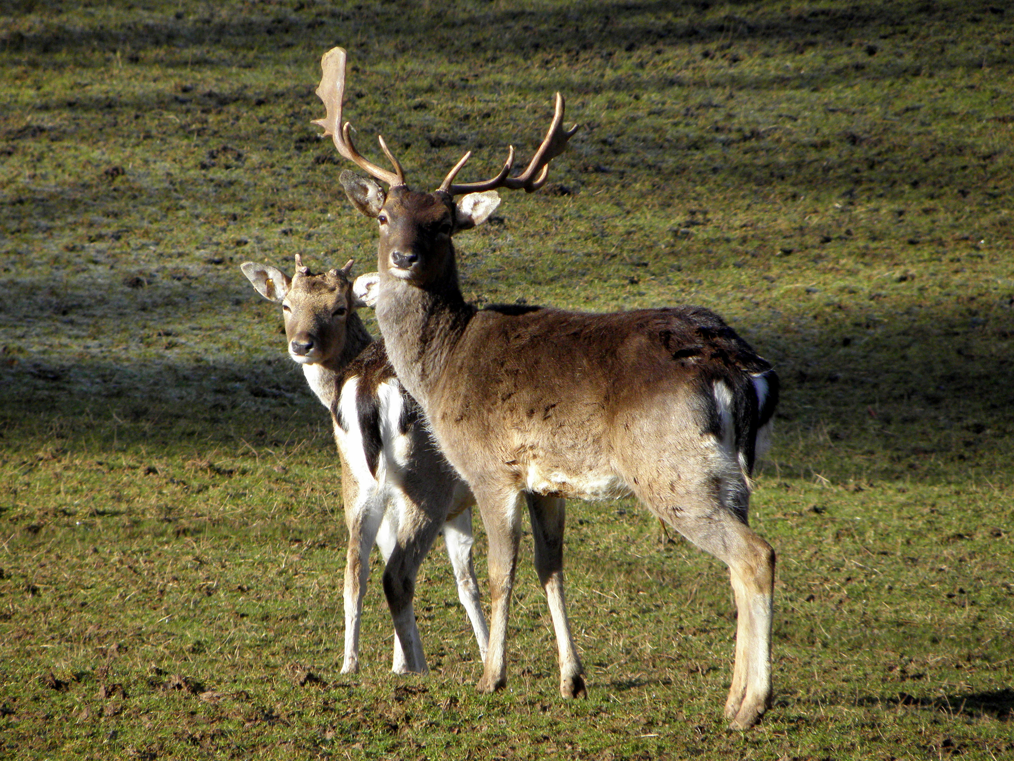 fallow deer